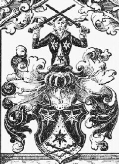 Wappen der Basler-Berner Patrizierfamilie Steck